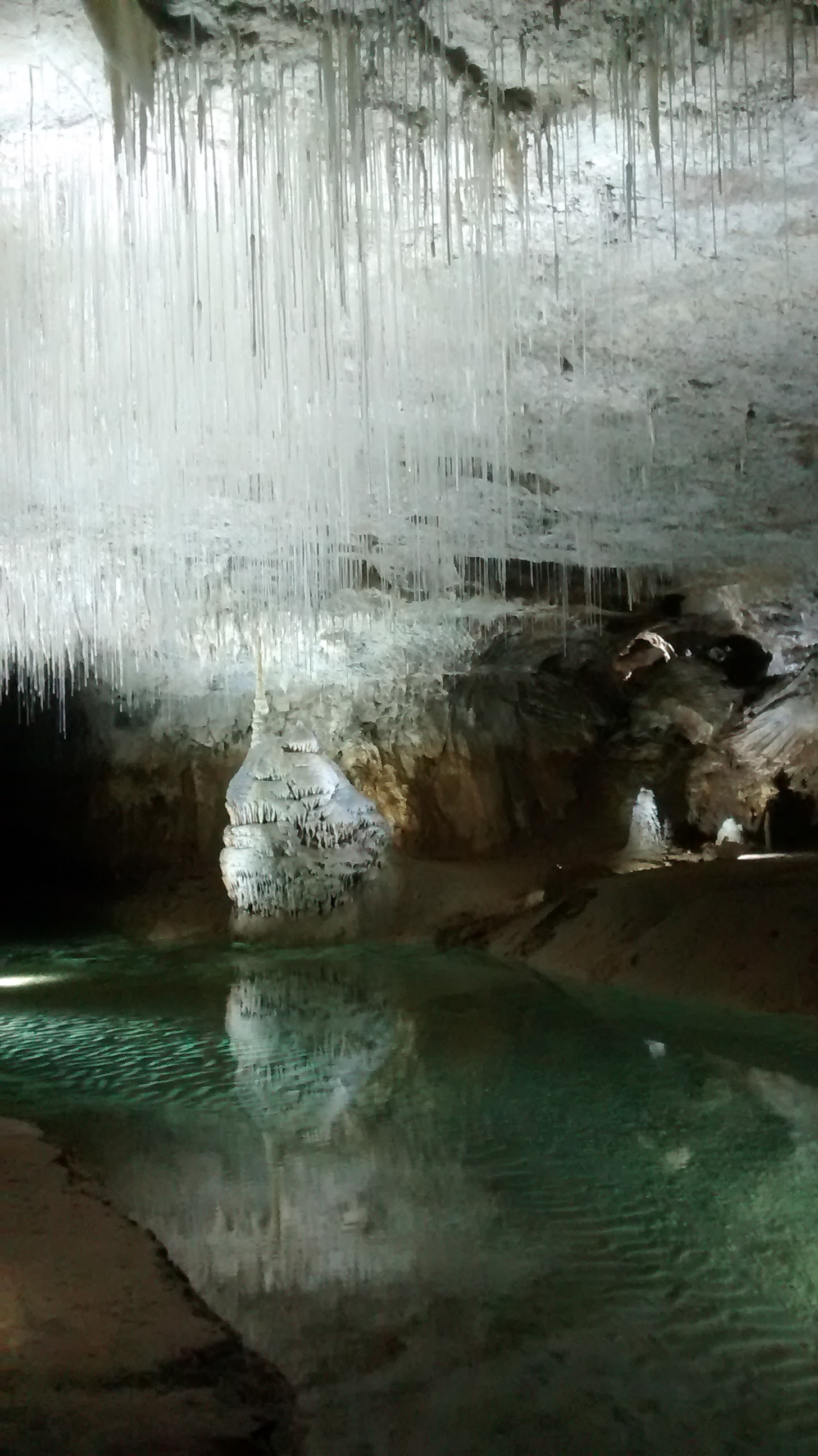 Interior de las Cuevas de Choranche.